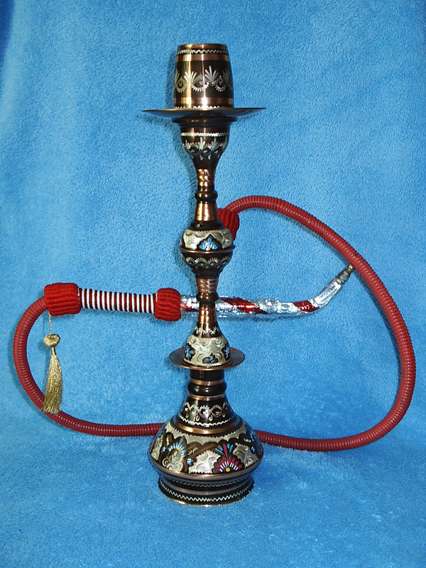 Турецкий кальян (в разобранном виде) Полностью медный, с чеканкой. Приобретён в Кемере, - Hookah from Turcia (Kemera), Cuprum